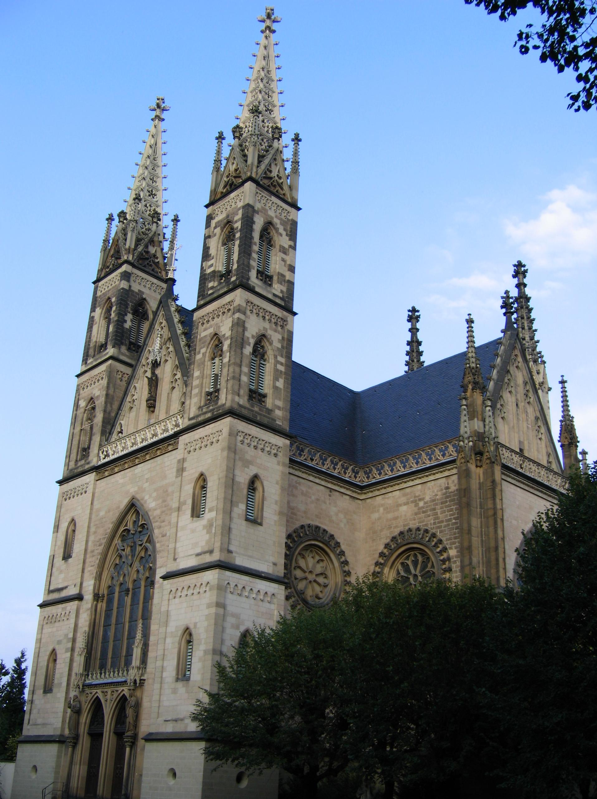 Apollinariskirche Remagen am Rhein